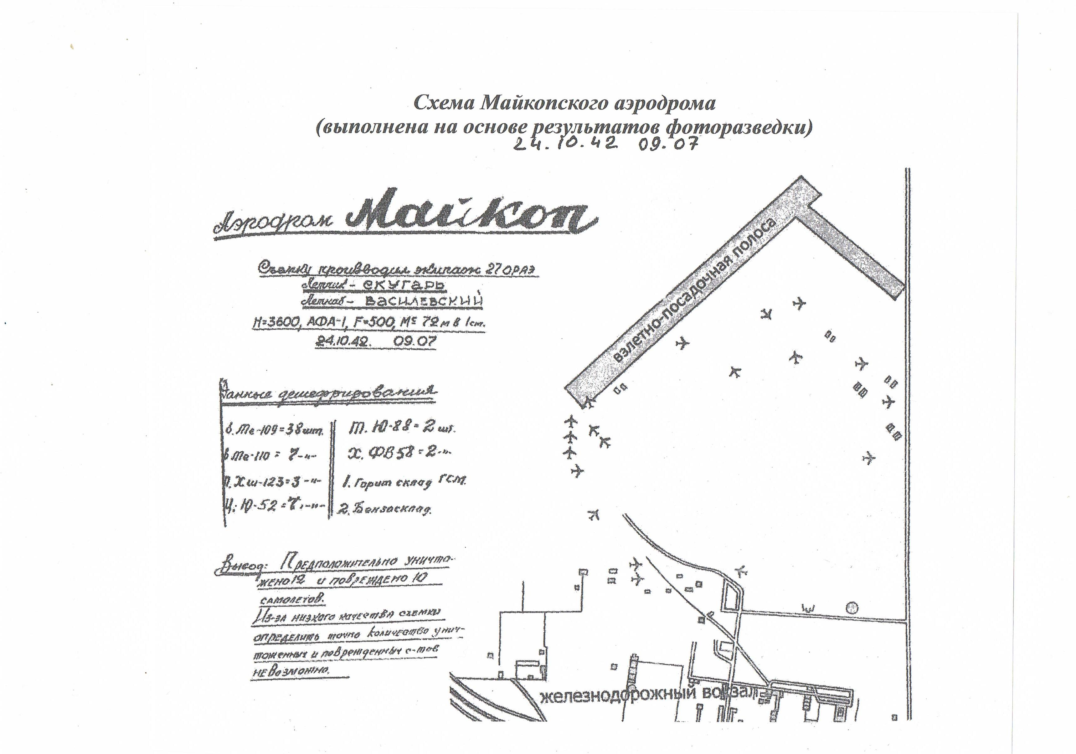 Схема Майкопского аэродрома на 9 час.07 мин 24.10.1942. Графическое изображение результатов Майкопского десанта на основе аэрофотоснимка.